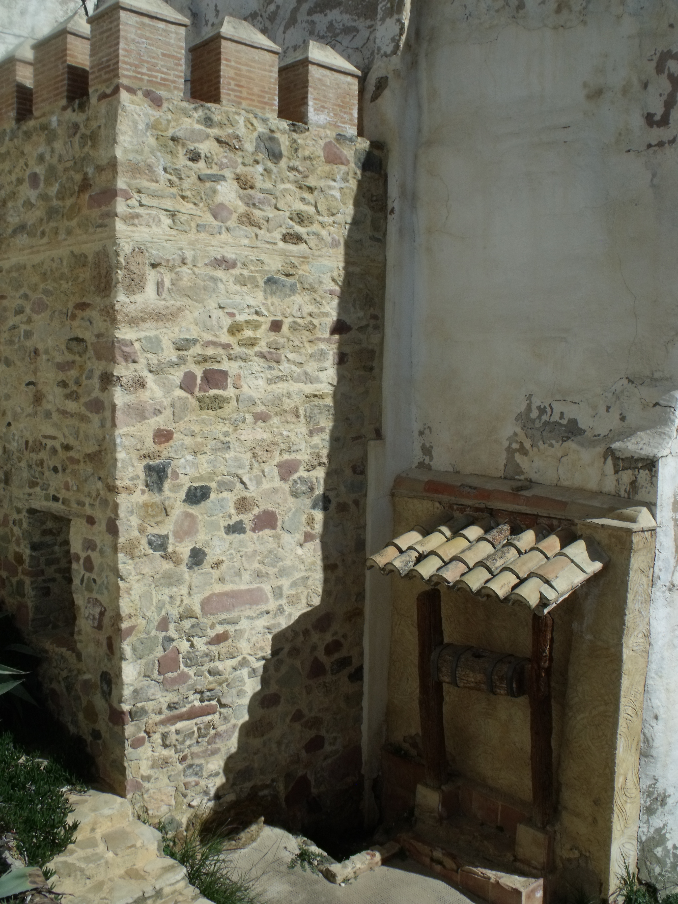 Restos de parte de la muralla de Tuéjar